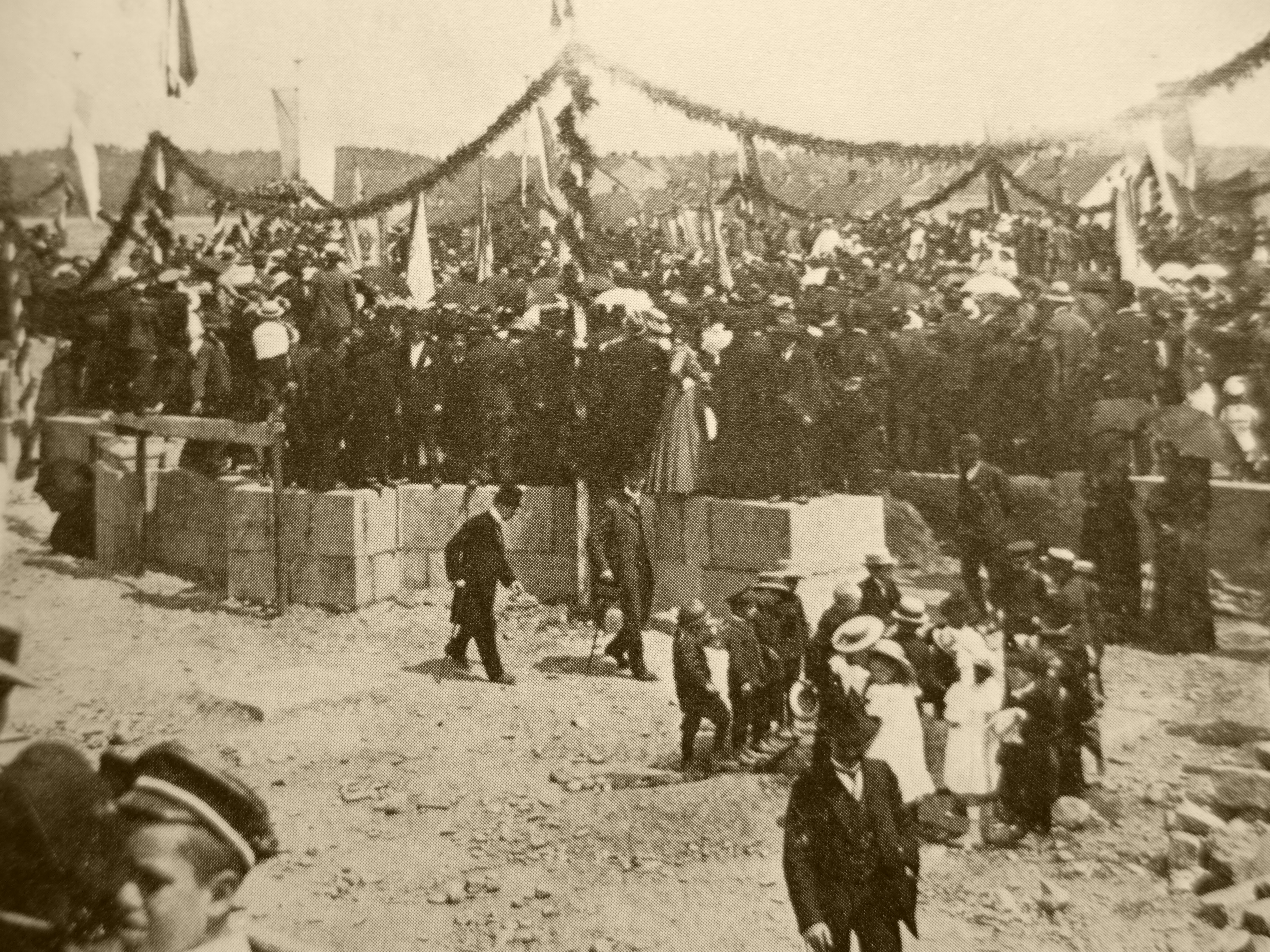 Grundsteinlegung zum Bau des Saardomes im Jahr 1911 (Stadtarchiv Dillingen)